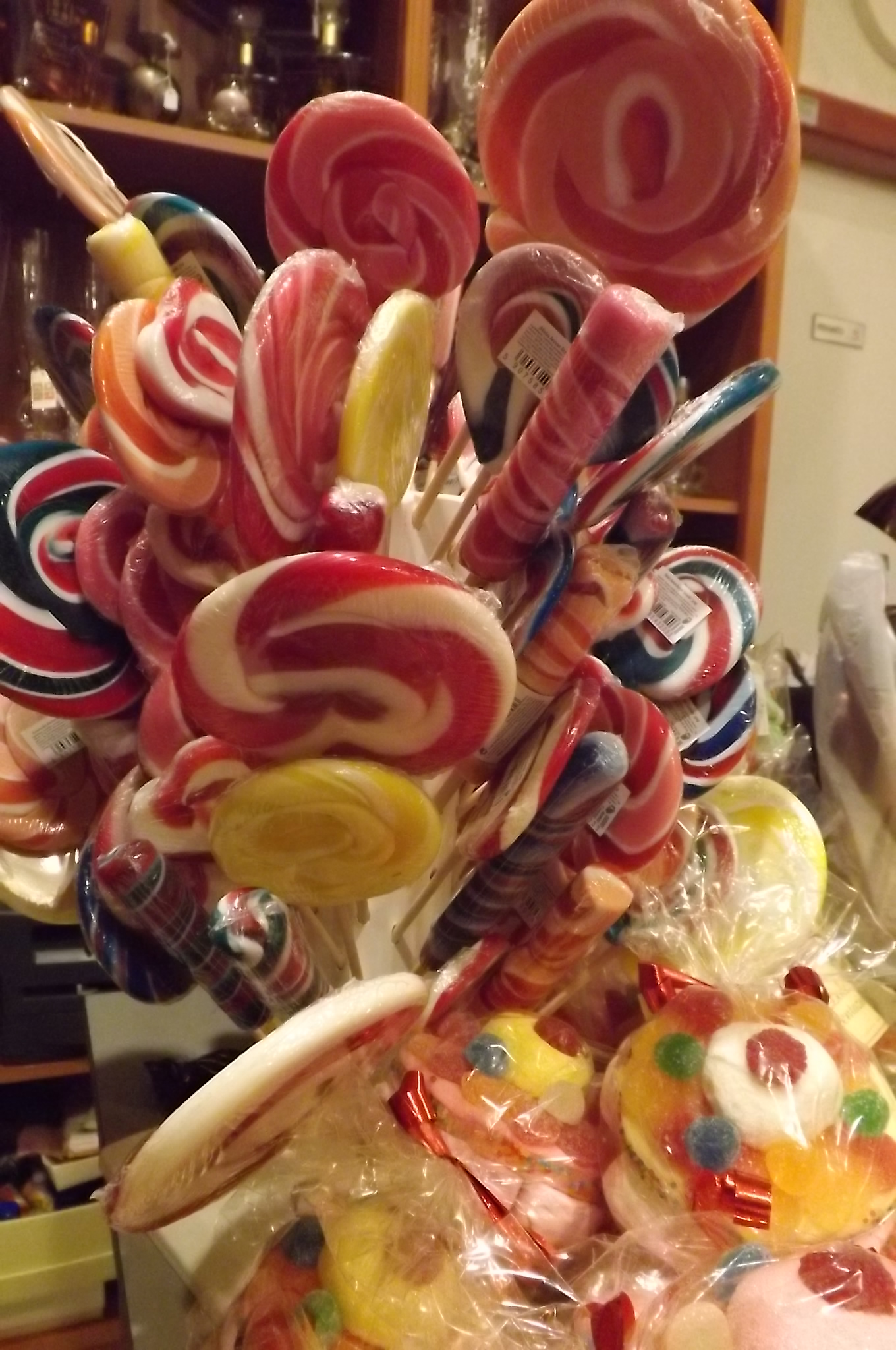 Foto scattata da Simpio96 a Padova. Passando vicimno alla Basilica di S.Antonio, mi ha attirato una vetrina